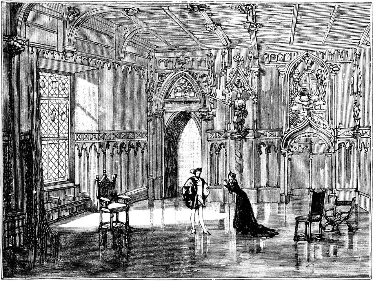 Saint-Saëns - Henry VIII - Illustrations de presse 1903 - 1er acte - Une salle du Palais Royal